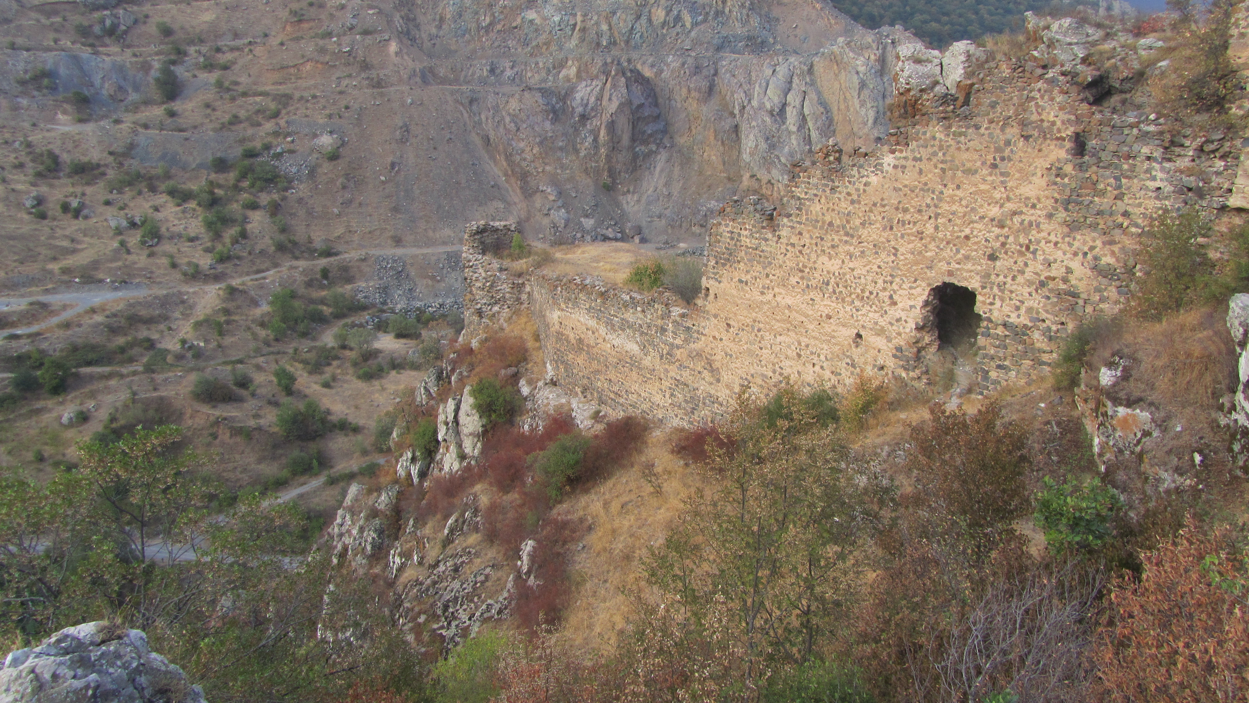 Ամրոց Բաղաբերդ (Դավիթ Բեկի բերդ) - Անդոկավան - քաղաքից ամ, Քաջա­րան տանող մայրուղուց ձախ, Ողջի գետի և նրա ձախ վտակ Գիրաթաղ գետակի միջև, բար­ձունքի վրա - Սյունիքի նշանավոր ամրոցներից էր, կիսավեր 13.1/1